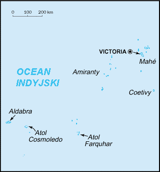 Mapa Seszeli (po polsku · in Polish)